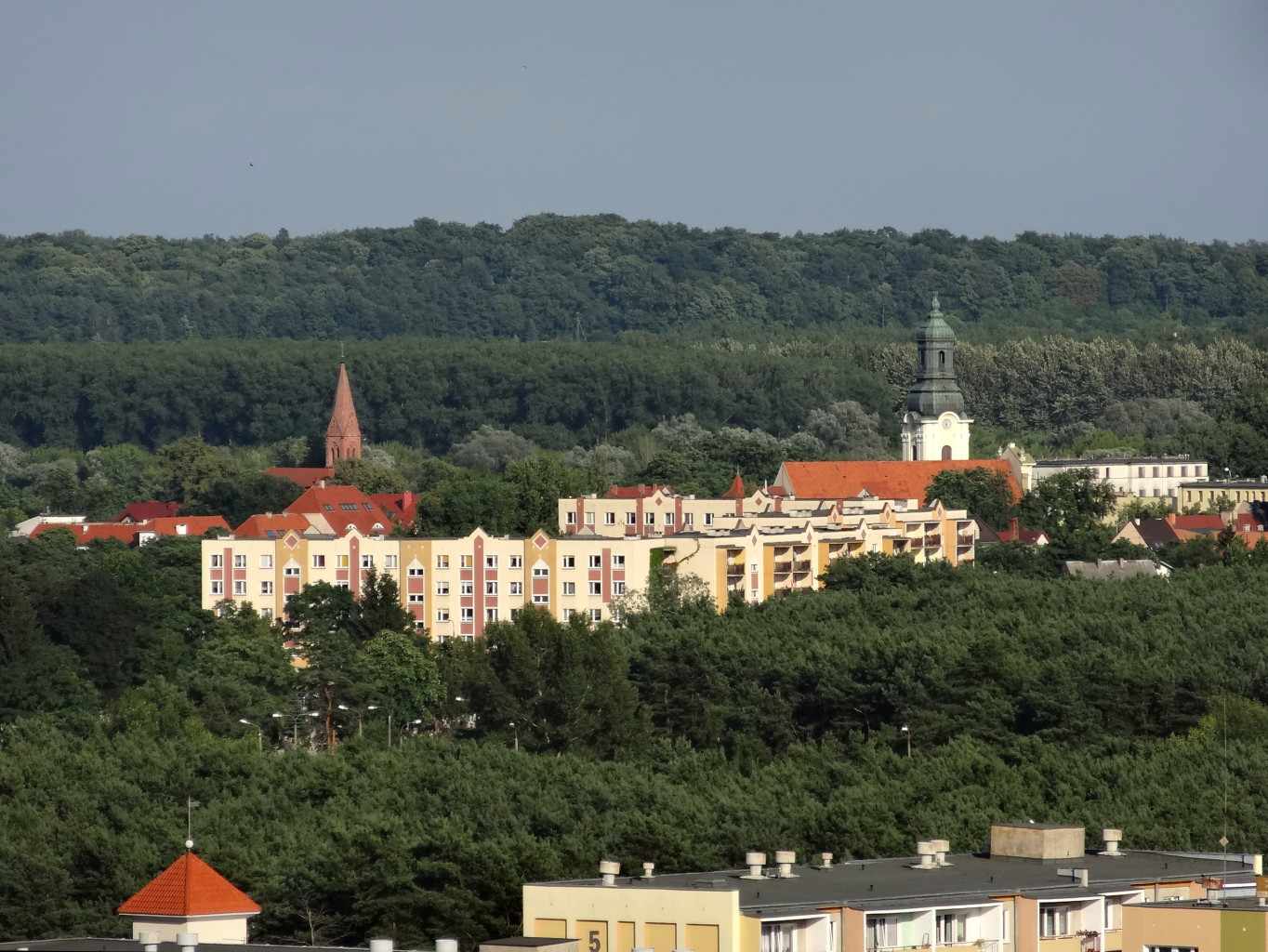 Stary Fordon (osiedle Bydgoszczy) - widok z Góry Szybowników